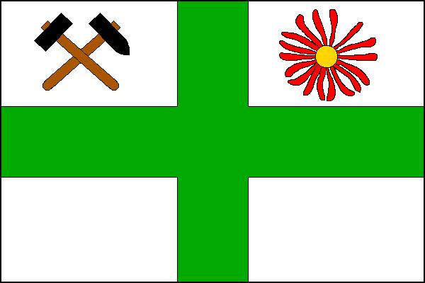 Vlajka obce Lomnice (okres Bruntál)